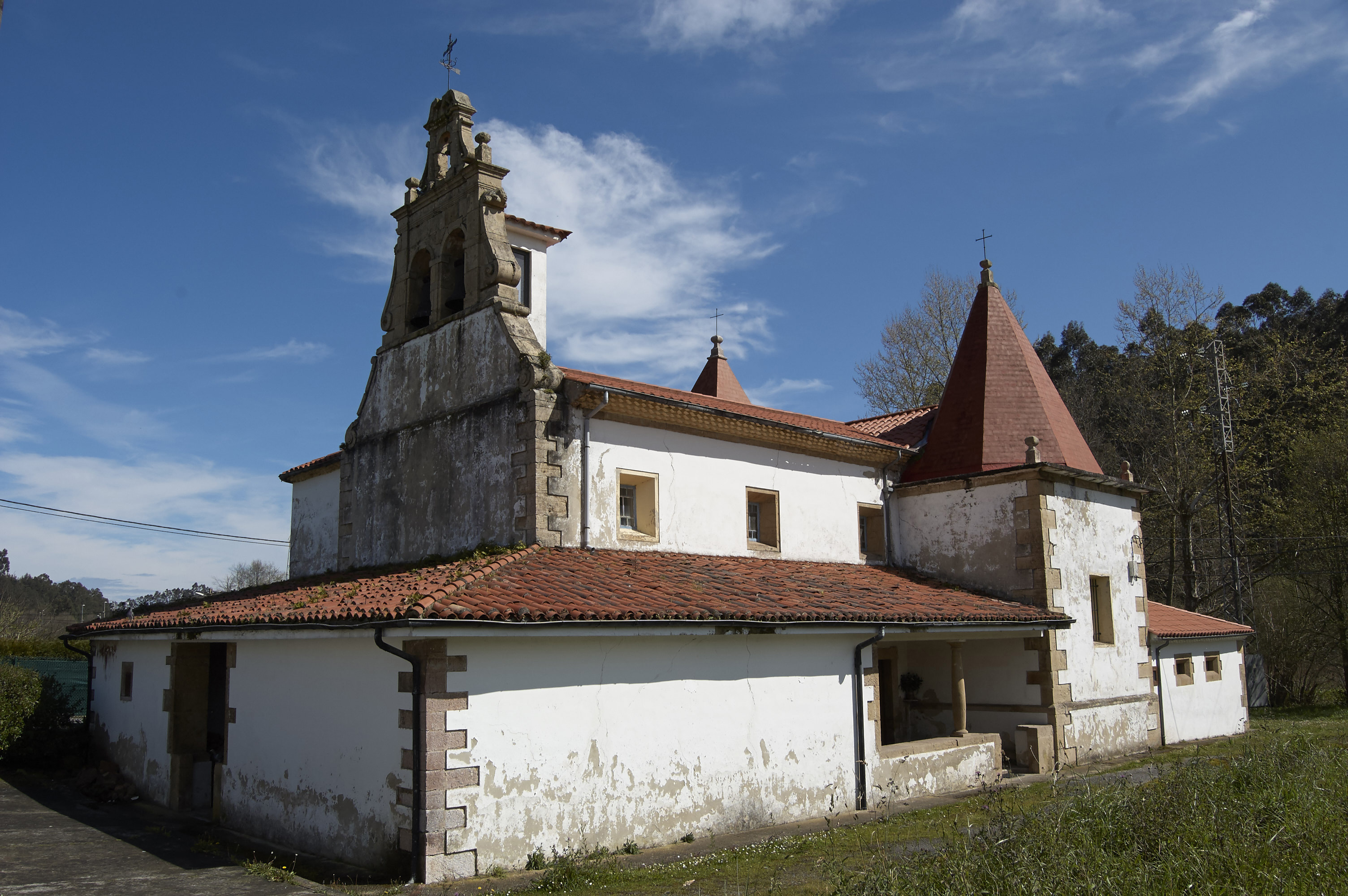 Iglesia de San Miguel de Quiloño, Castrillón, Asturias.